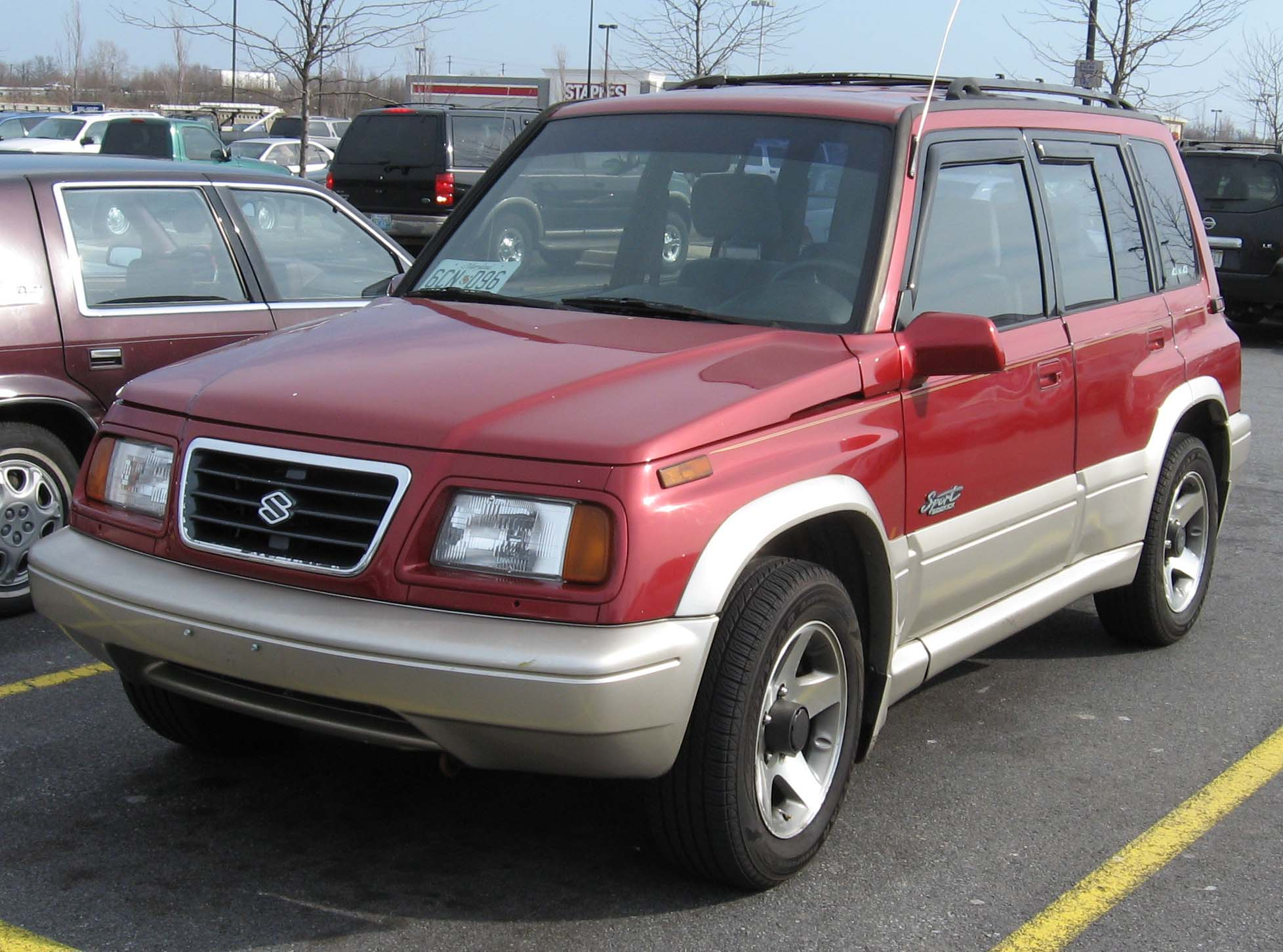 Suzuki Sidekick Sport photographed in USA.